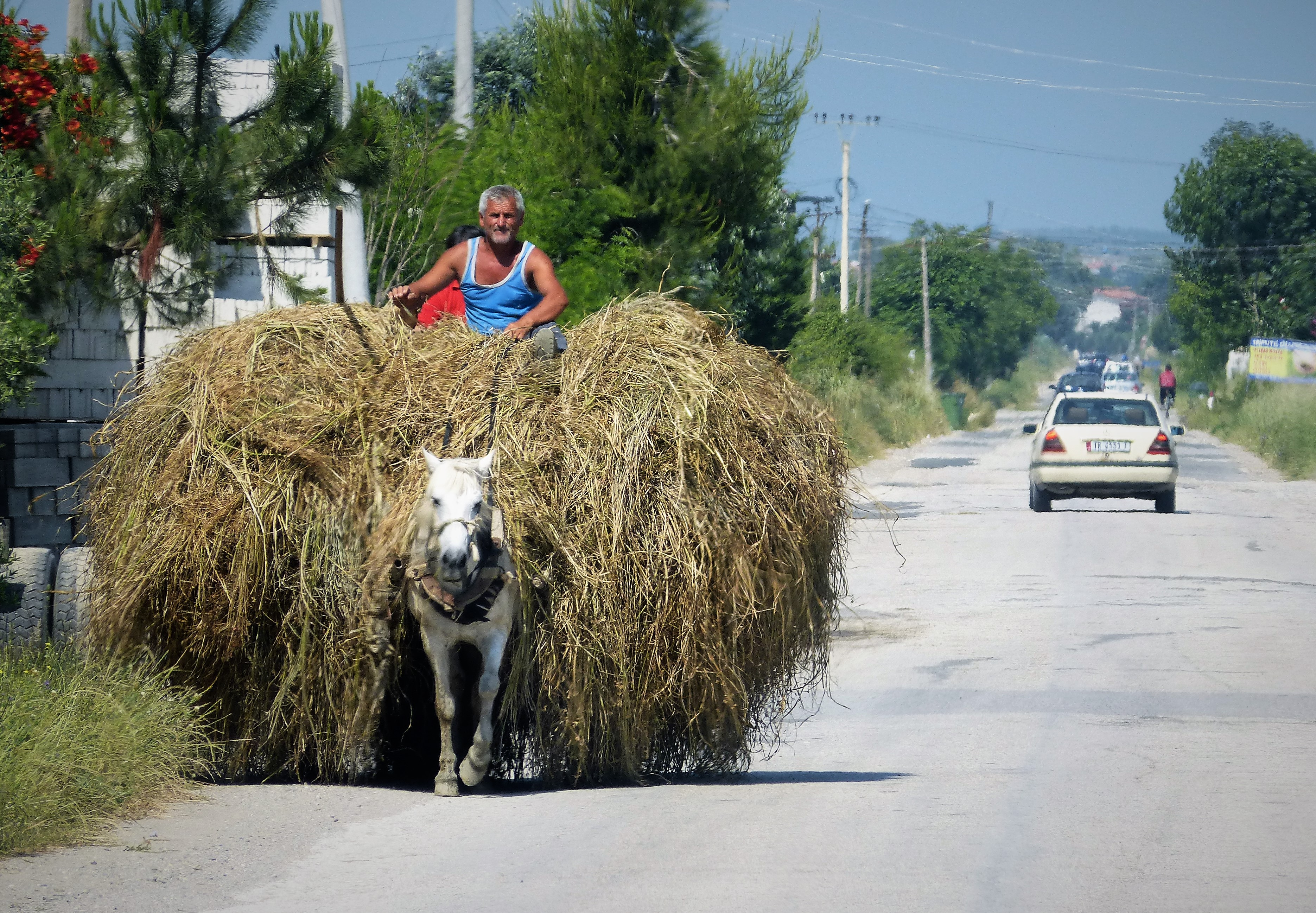 Albania